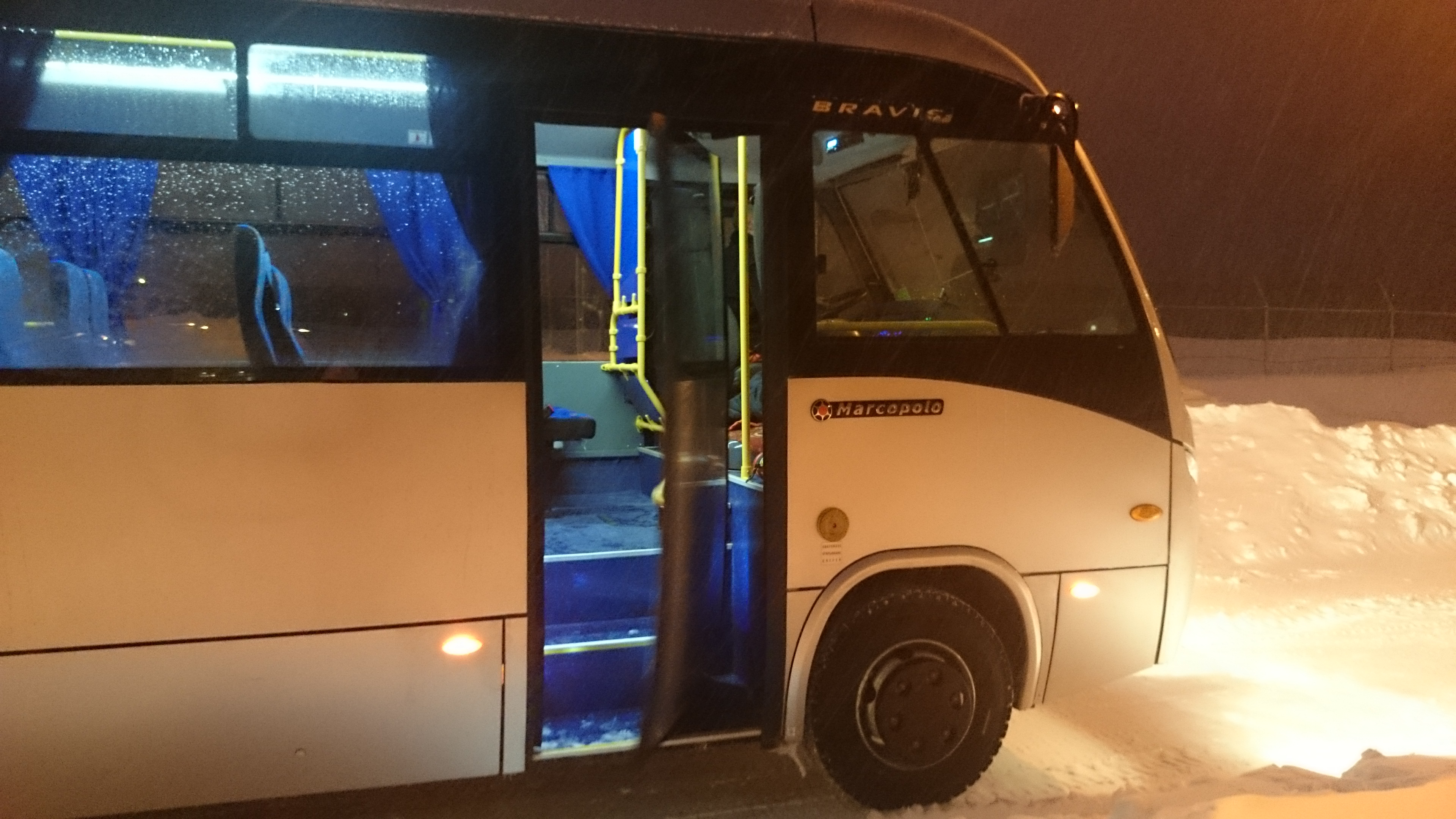 Kamaz Marcopolo Bus